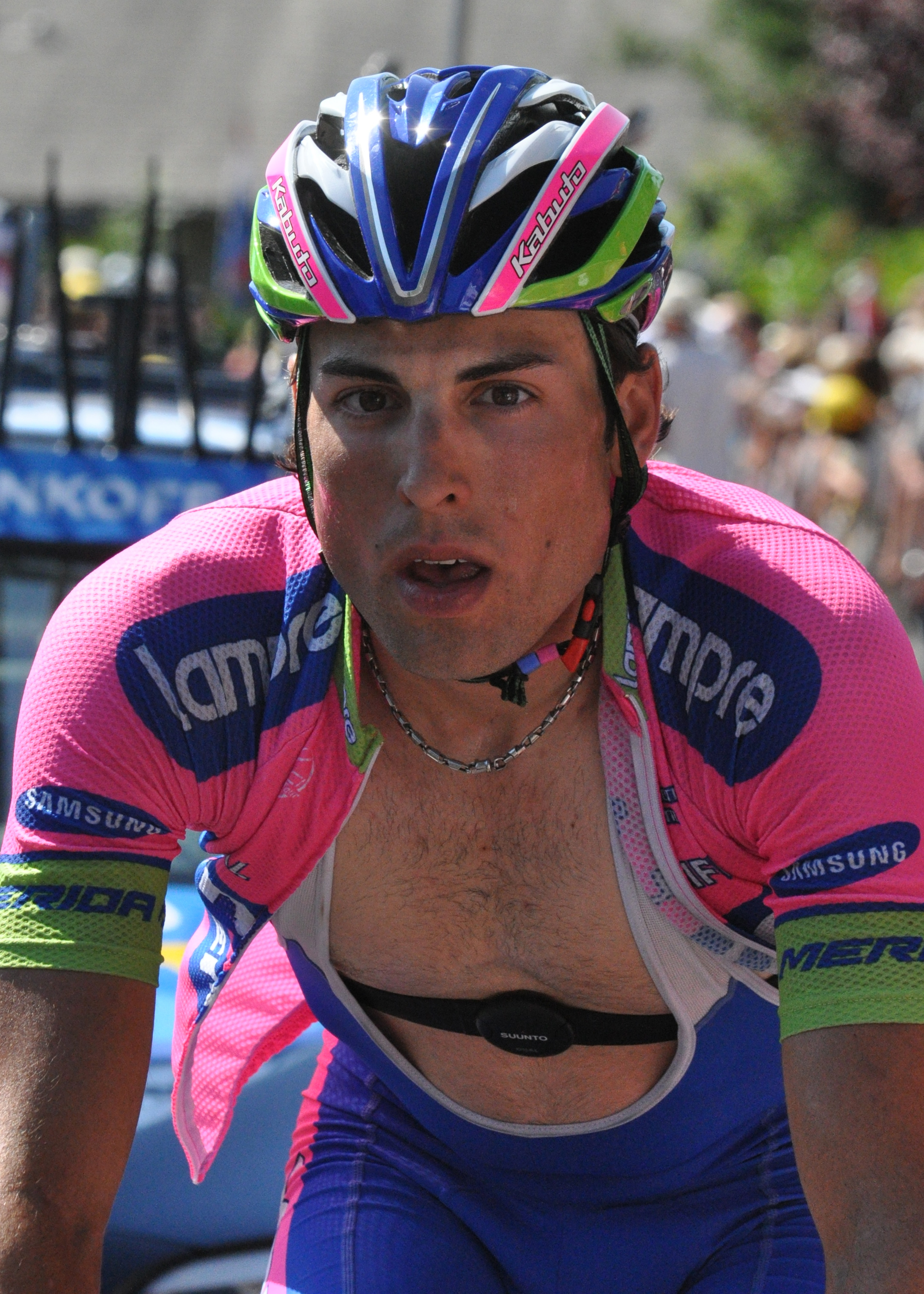 Etape 20 (Annecy – Annecy-Semnoz) du Tour de France 2013